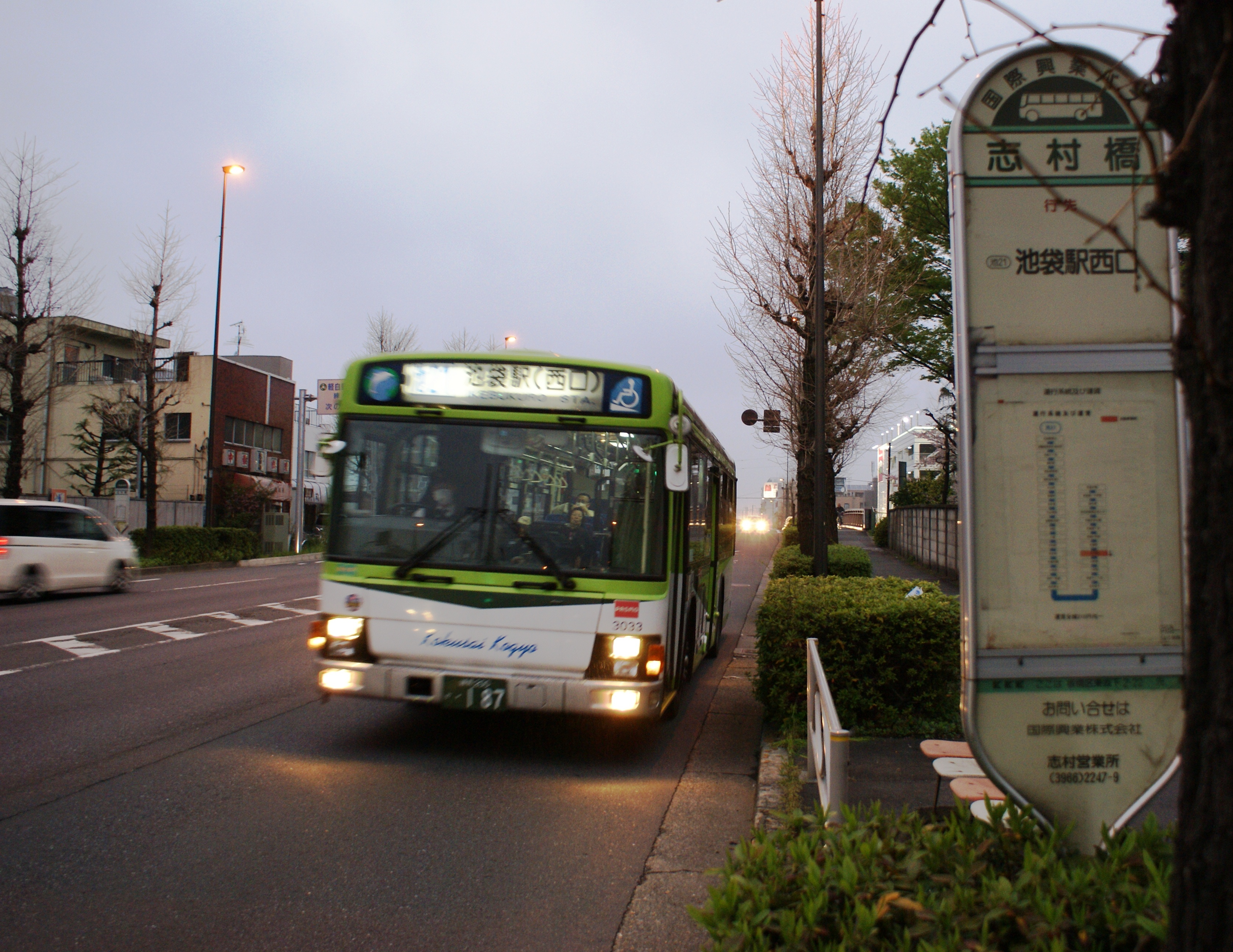 かつての都電終点、志村橋停留所